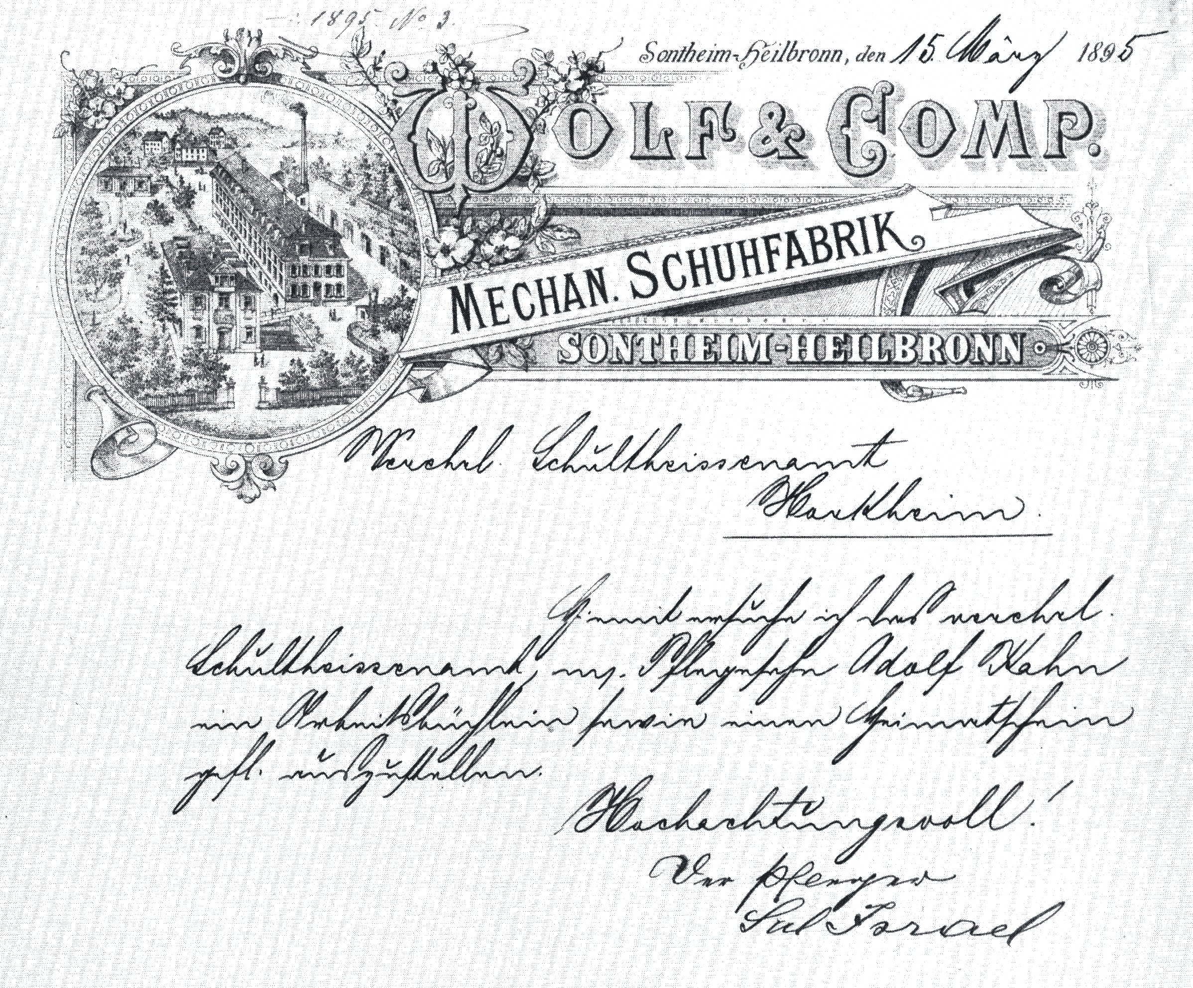 Briefkopf der Schuhfabrik Wolf & Comp. in Sontheim mit Mitteilung des Salomon Israel als Pfleger des Adolf Kahn an das Schultheißenamt in Horkheim